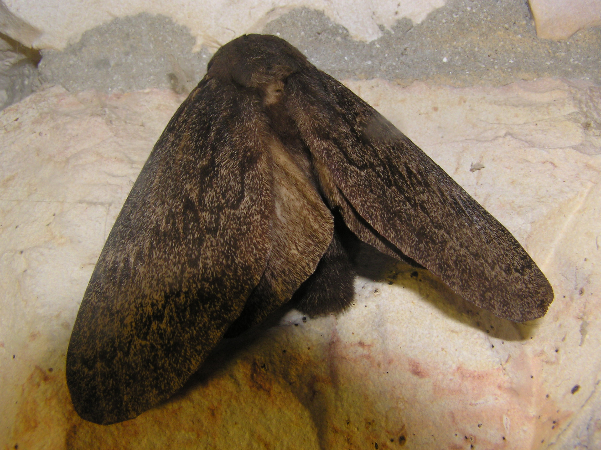 Pachypasa otus, taken in Jerusalem, Israel